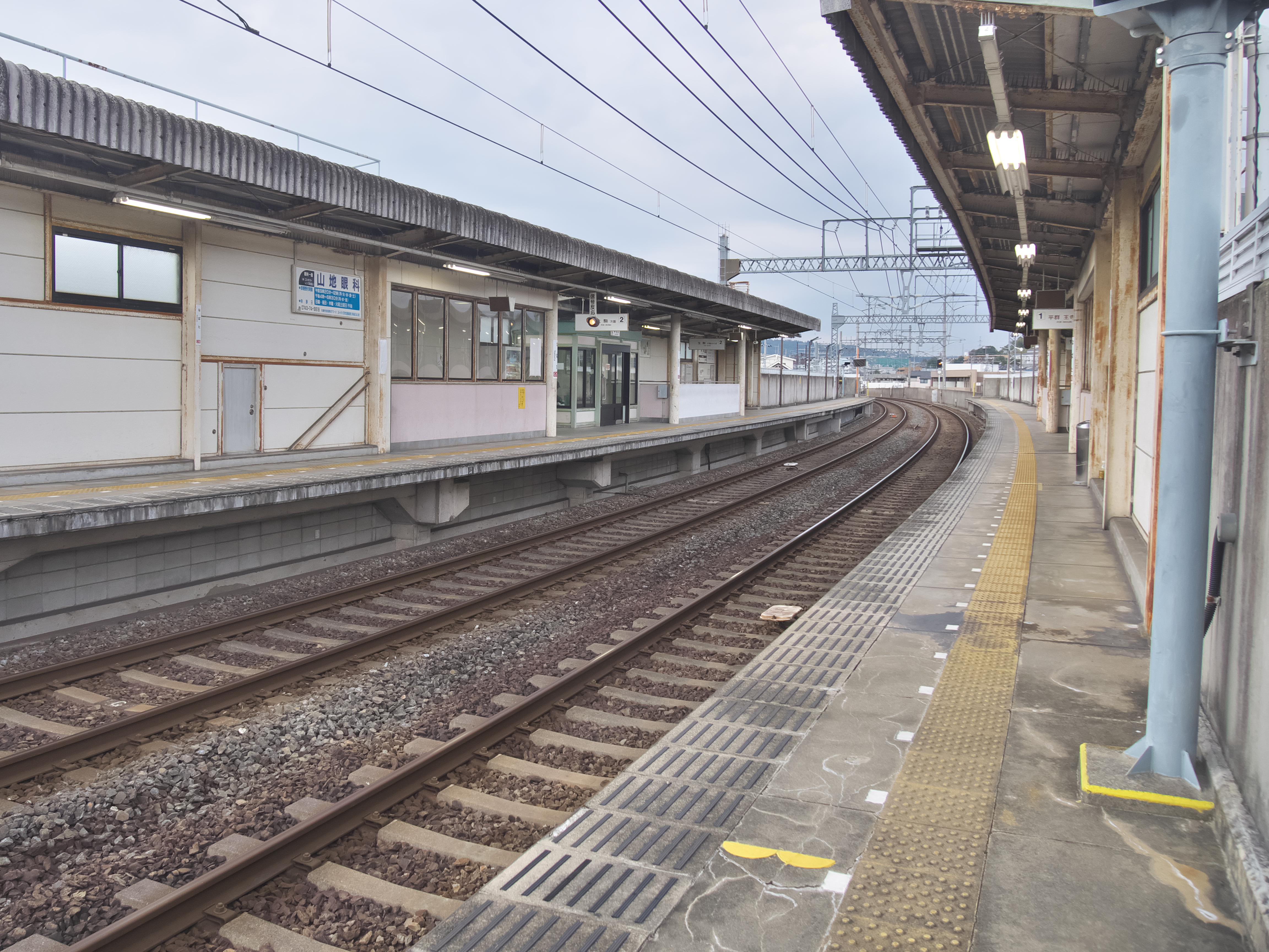 1番乗り場王寺側から生駒側を見た様子